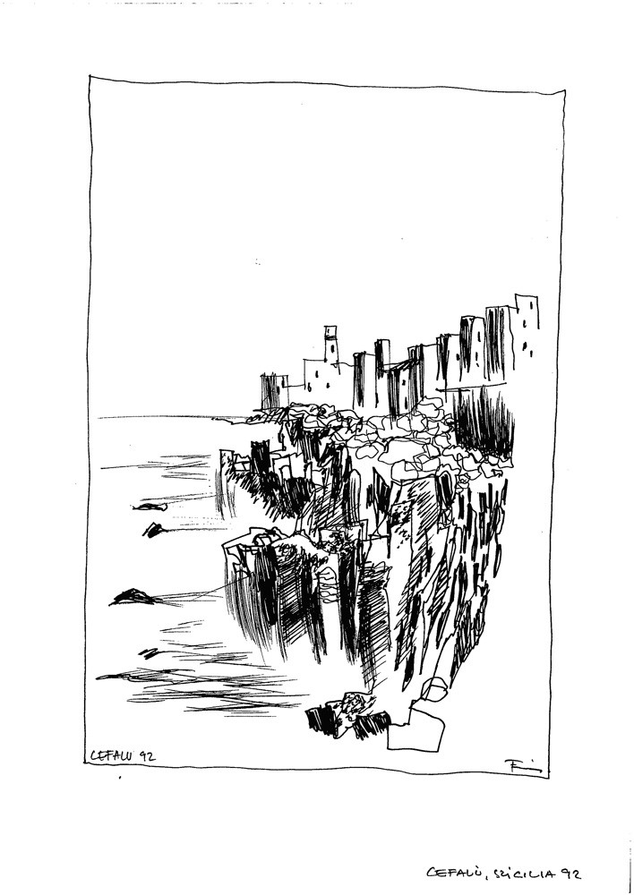 Cefalú, Szicília, Olaszország (útirajz)